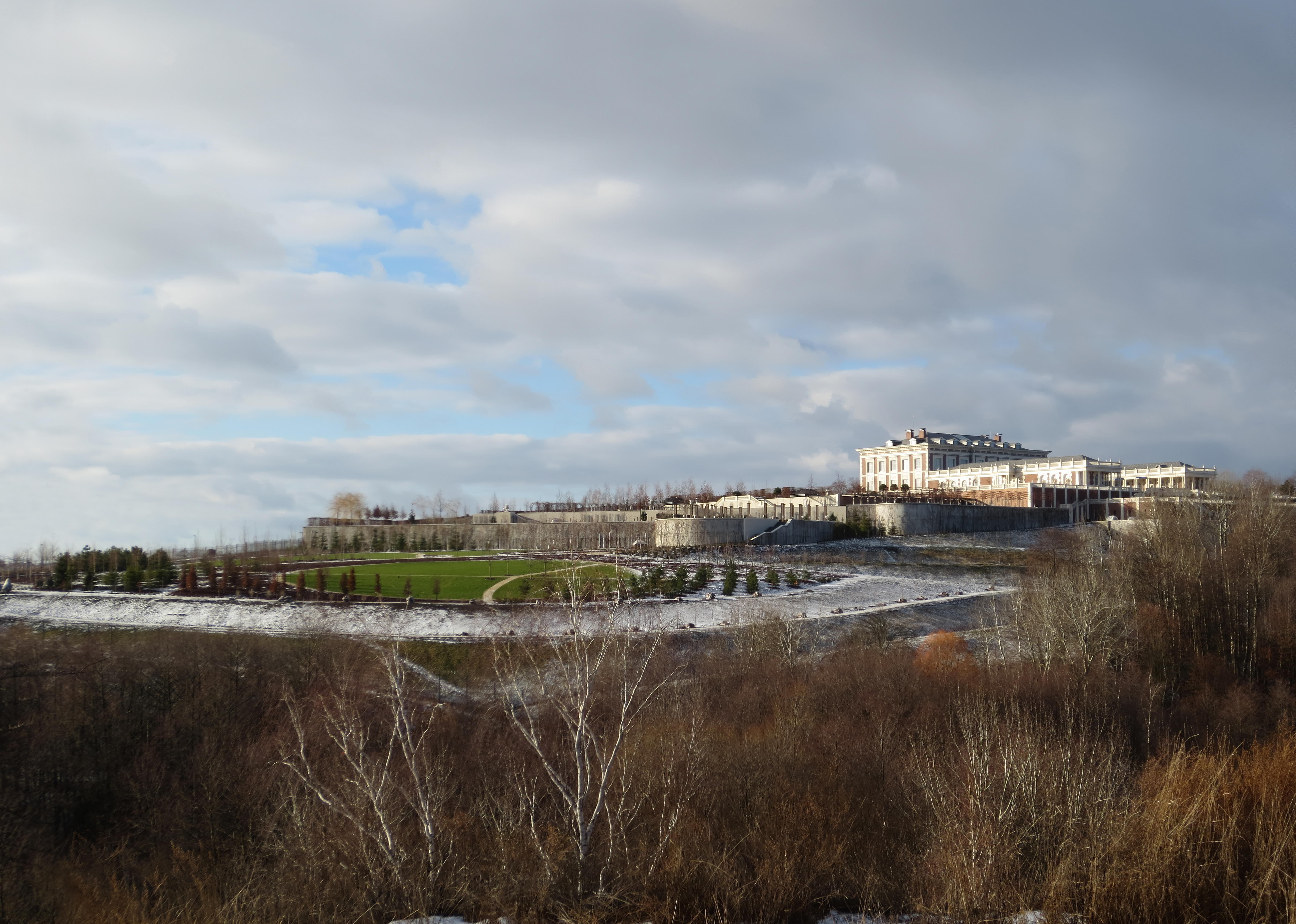 На місці північної частини Хотівського городища.